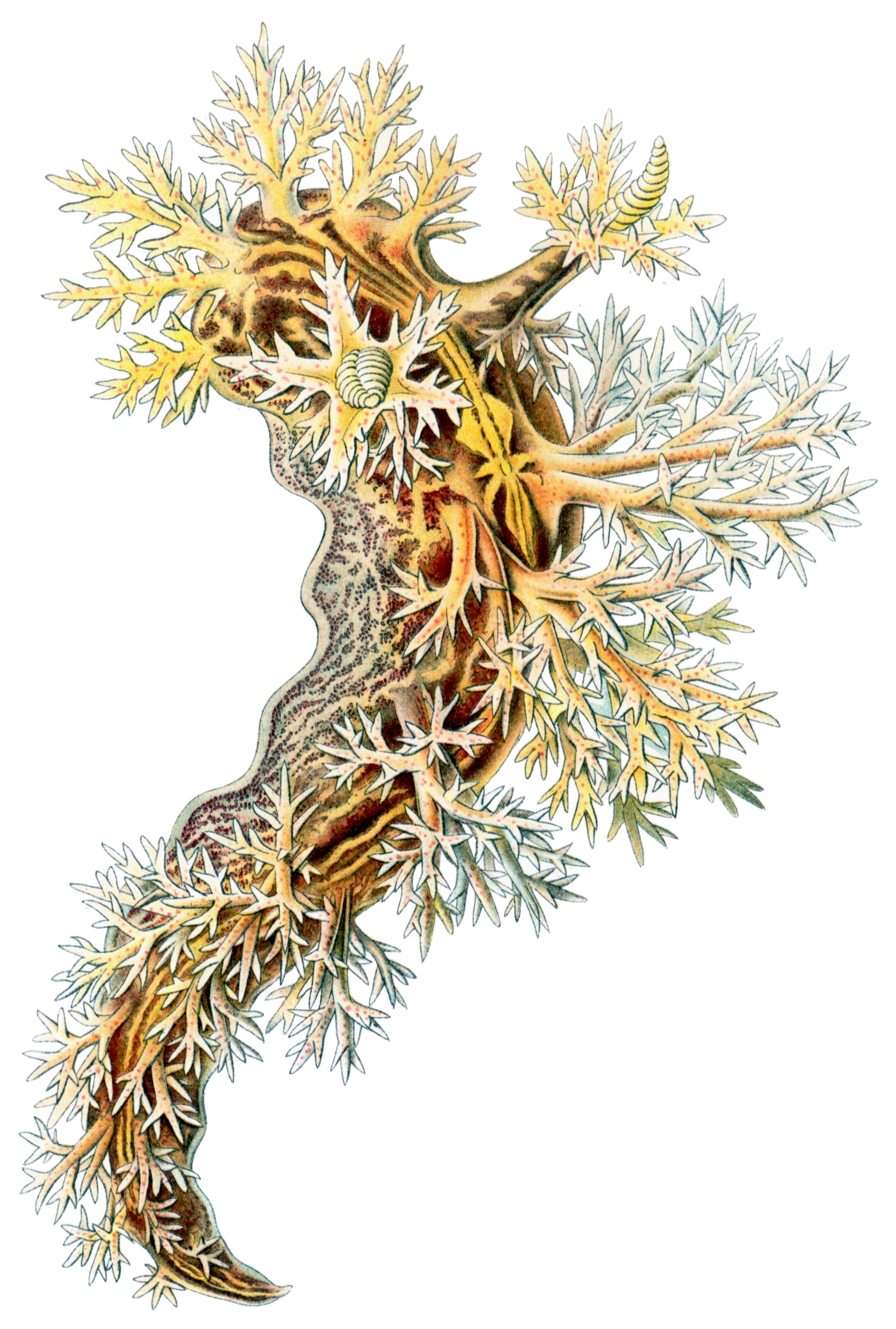 Dendronotus arborescens (Alder) = Dendronotus frondosus (Ascanius, 1774)